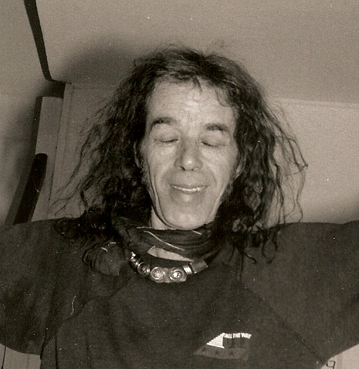 Sky Saxon